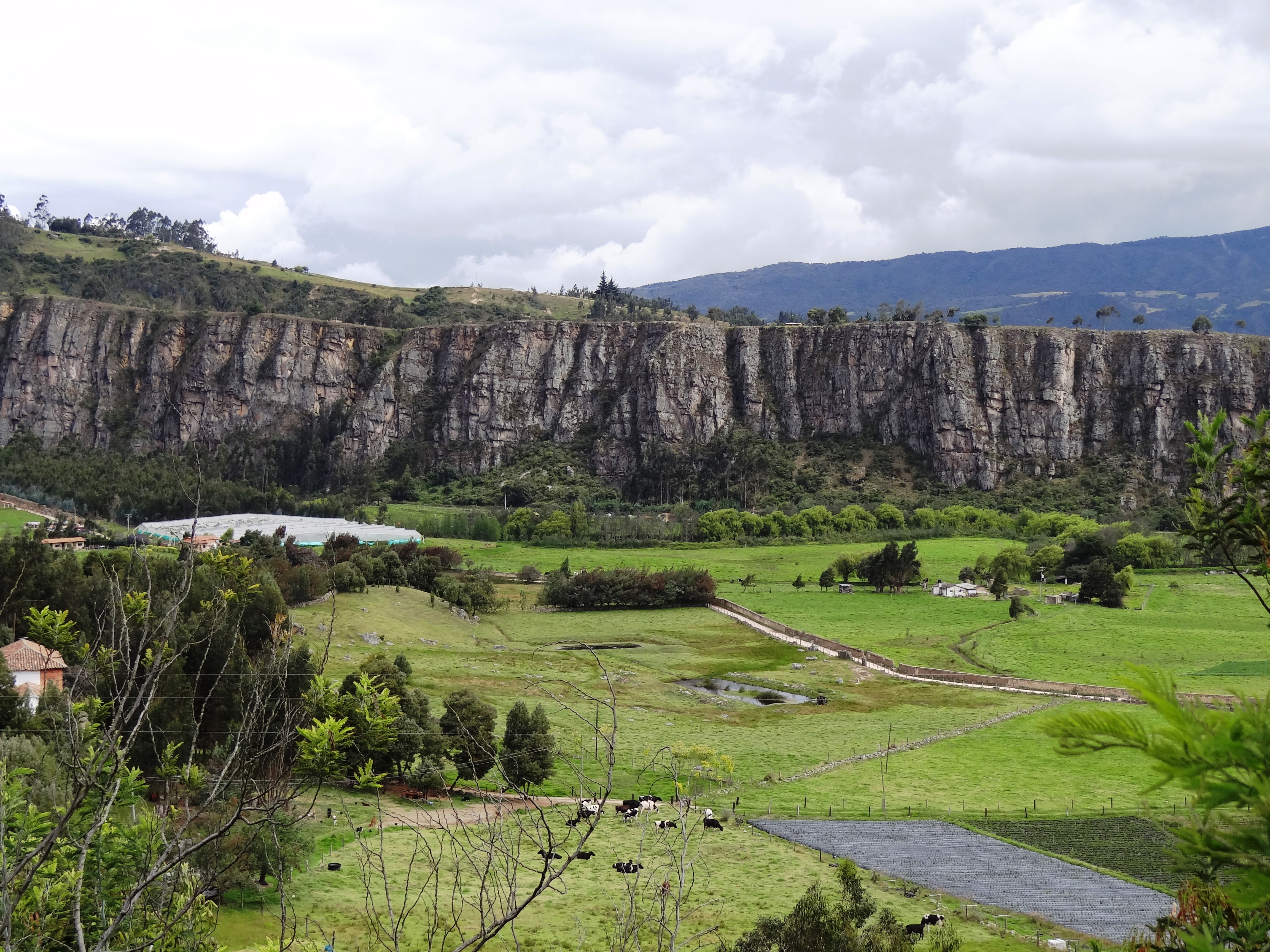 Rocas de Suesca en el municipio de Suesca, departamento de Cundinamarca, Colombia